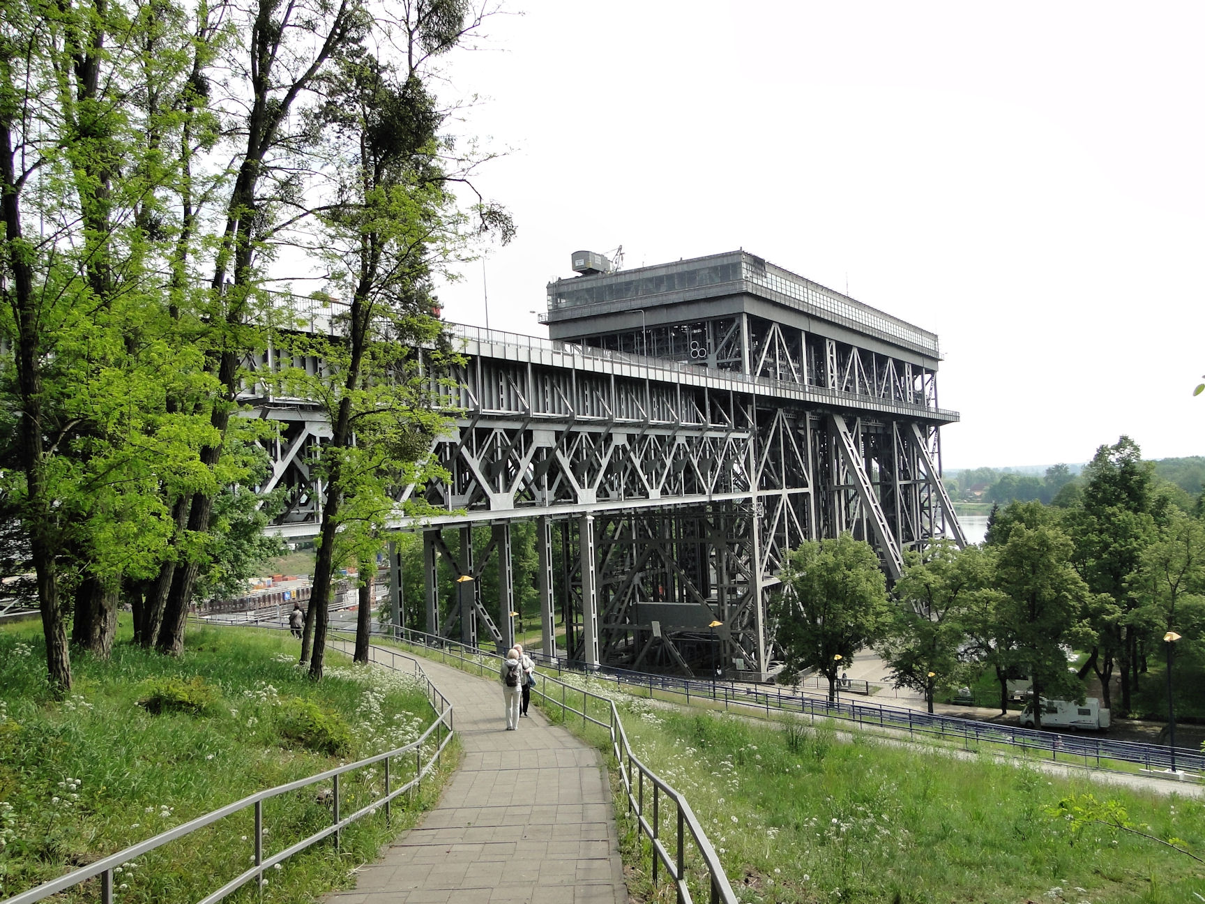 Podnośnia statków w Niederfinow (Niemcy)